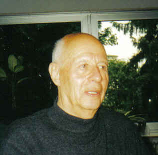 Erwin Axer im Jahre 2001. Privates Foto von Historyk.